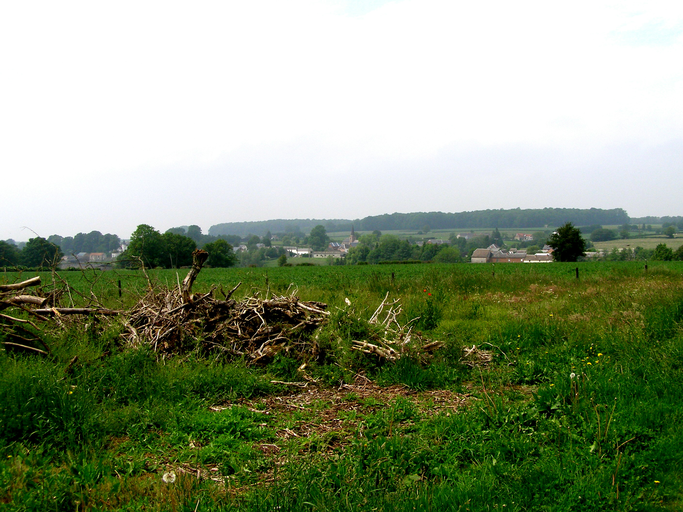 Vue d'ensemble du village.